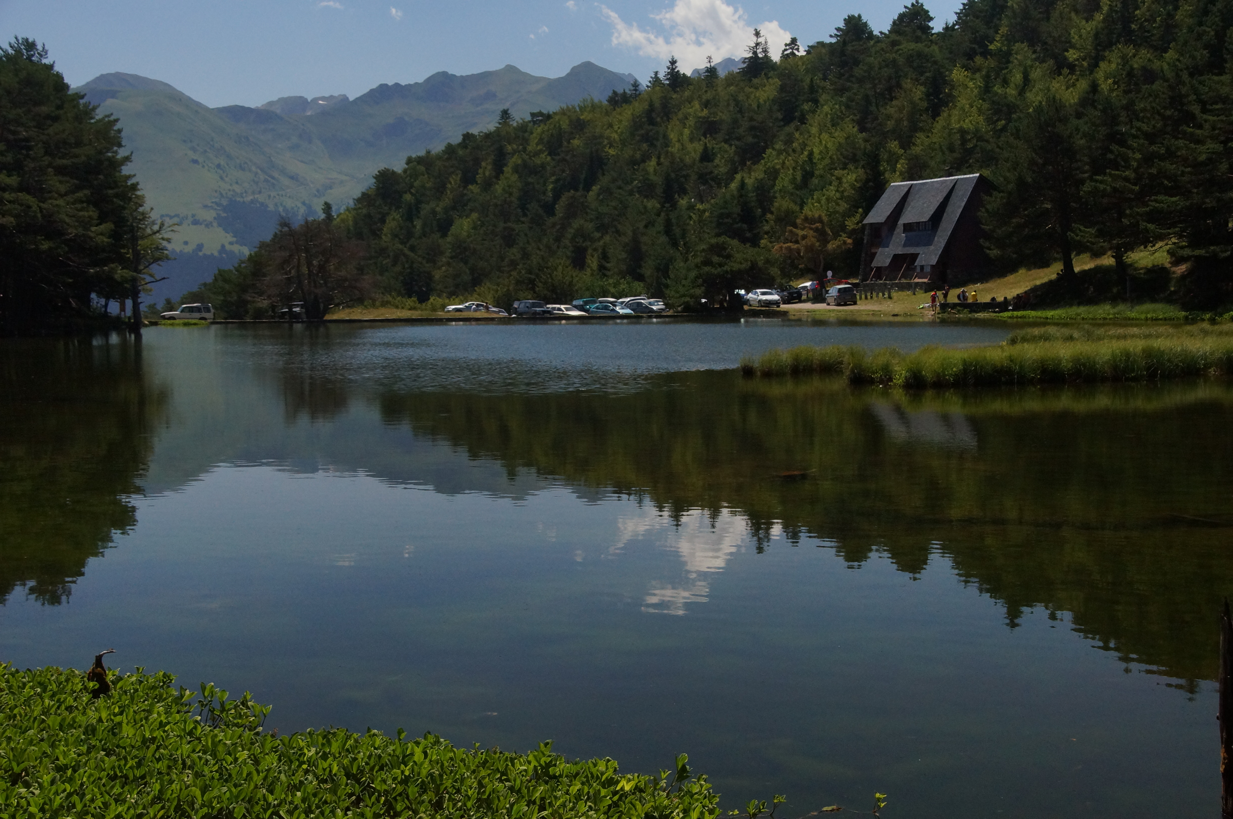 Bassa d'Oles (Vielha e Mijaran) This is a a photo of a wetland in Catalonia, Spain, with id: IZHC-22003902